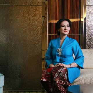 Anggota DPR RI - Fraksi NasDem.